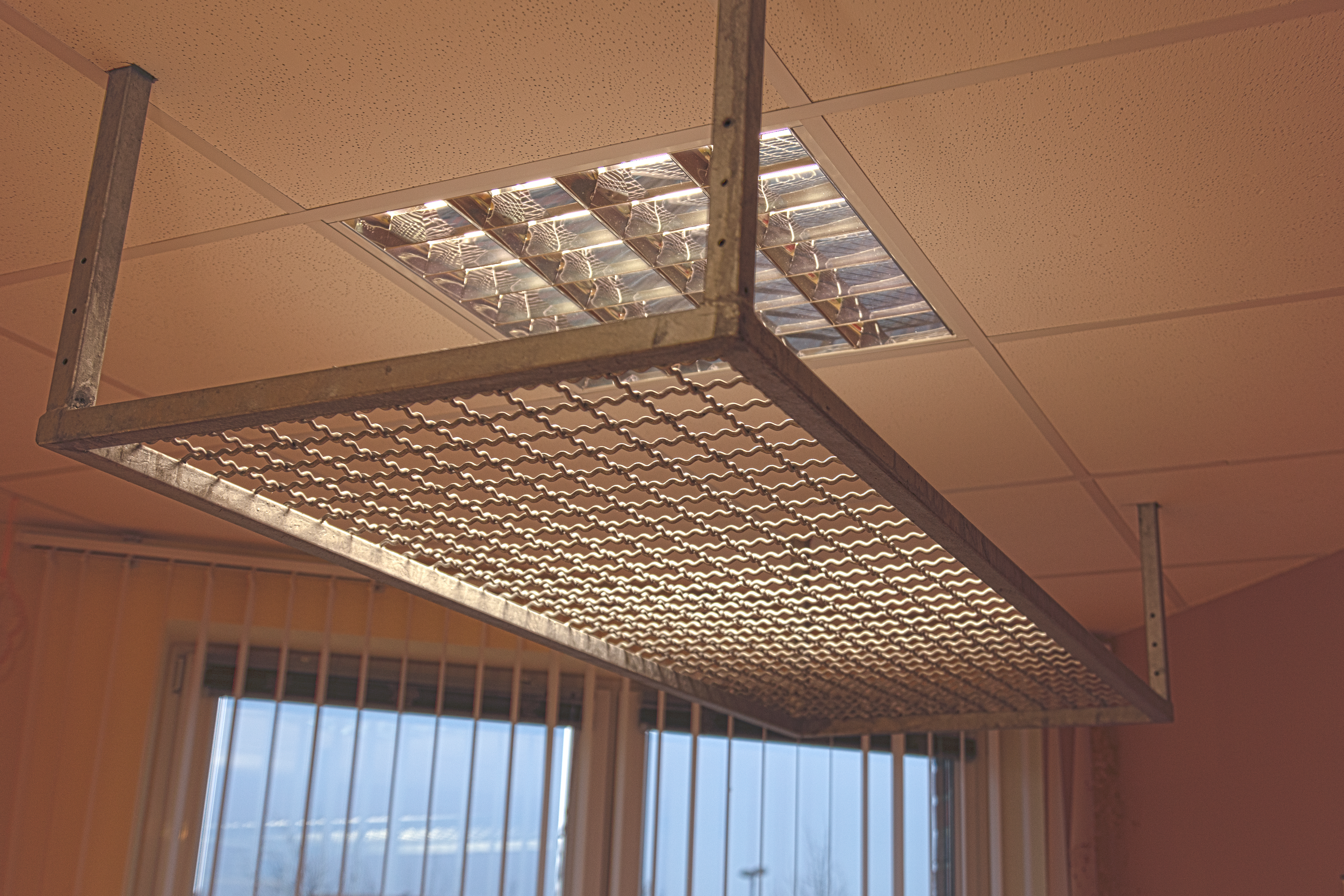 Schlingentisch